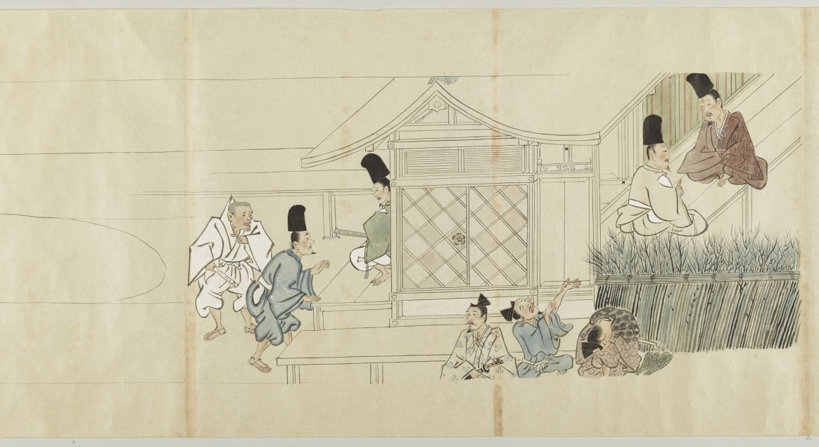 Copie de l'emaki de l'Histoire d'un peintre. Détail de la deuxième peinture.